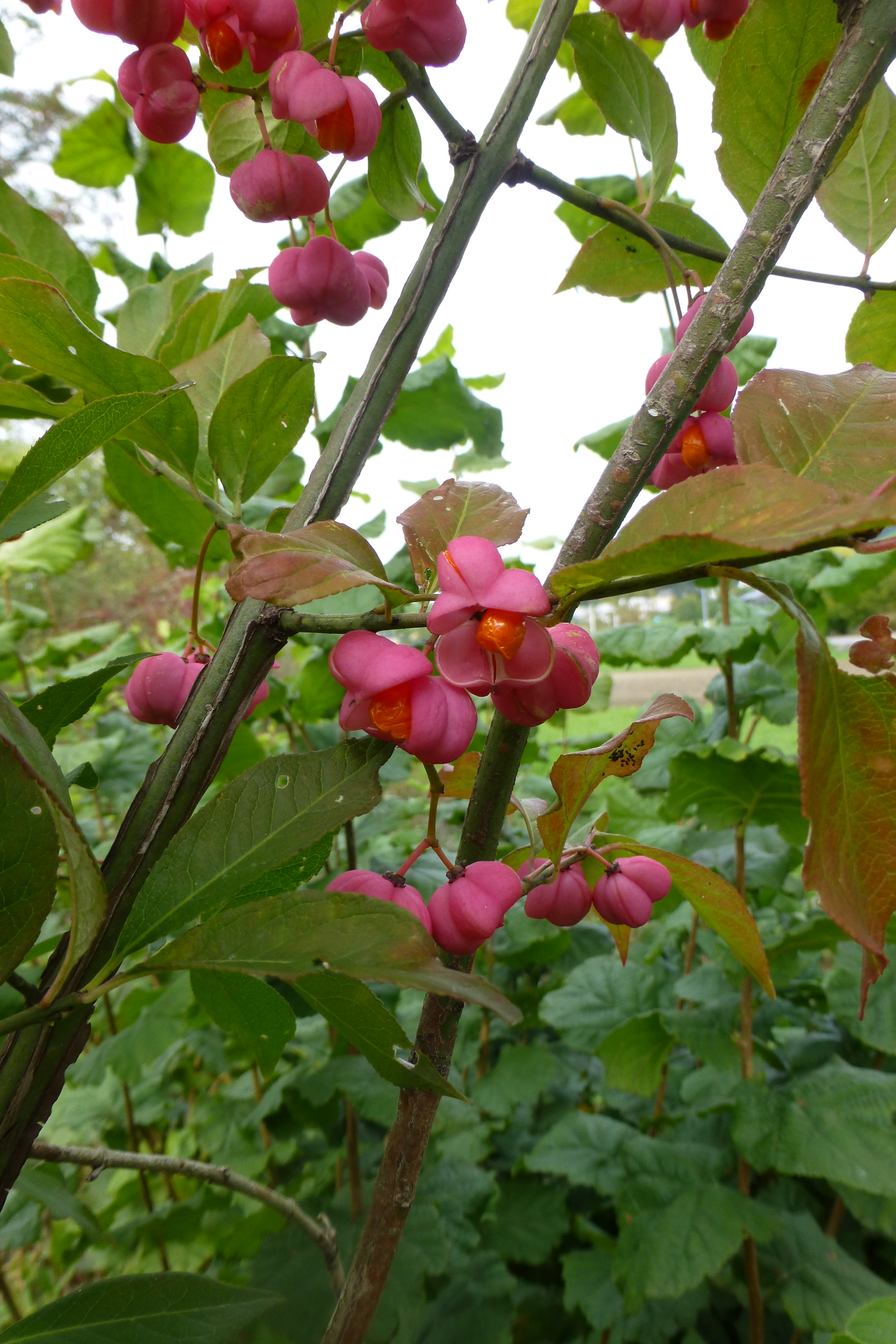 Pfaffenhütchen (Spindelstrauch) Früchte und Zweige mit Korkleisten.